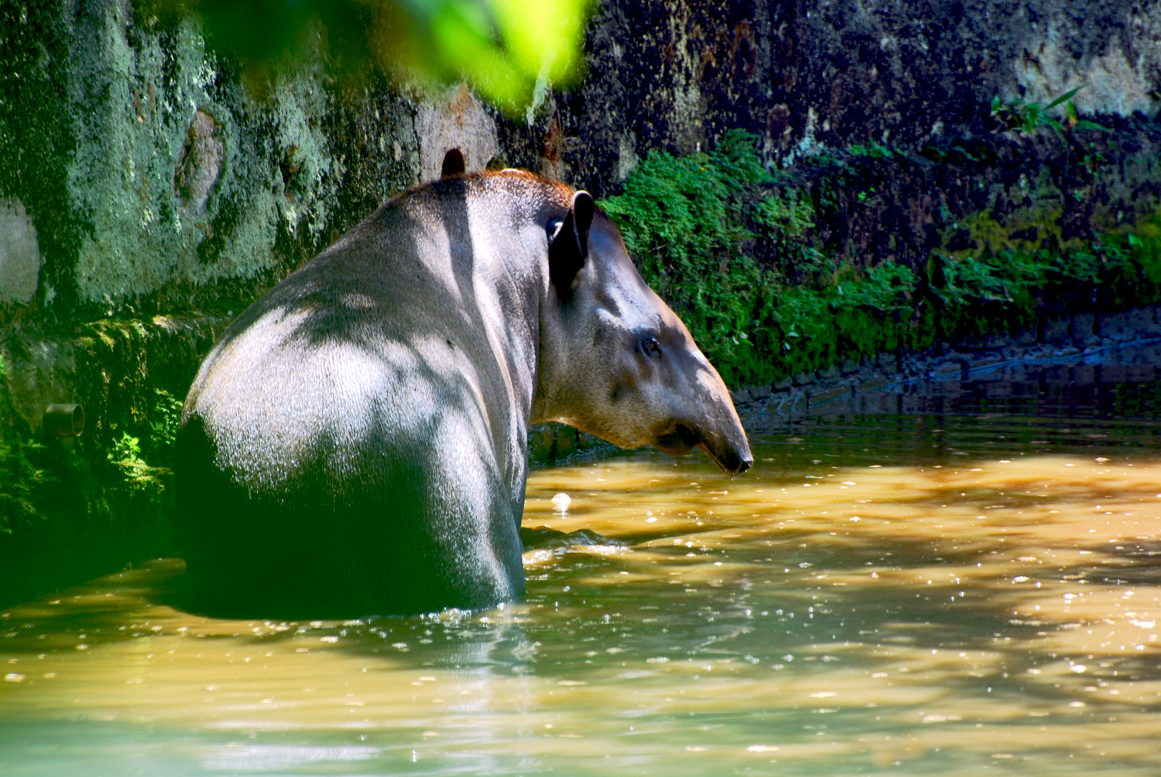 Anta